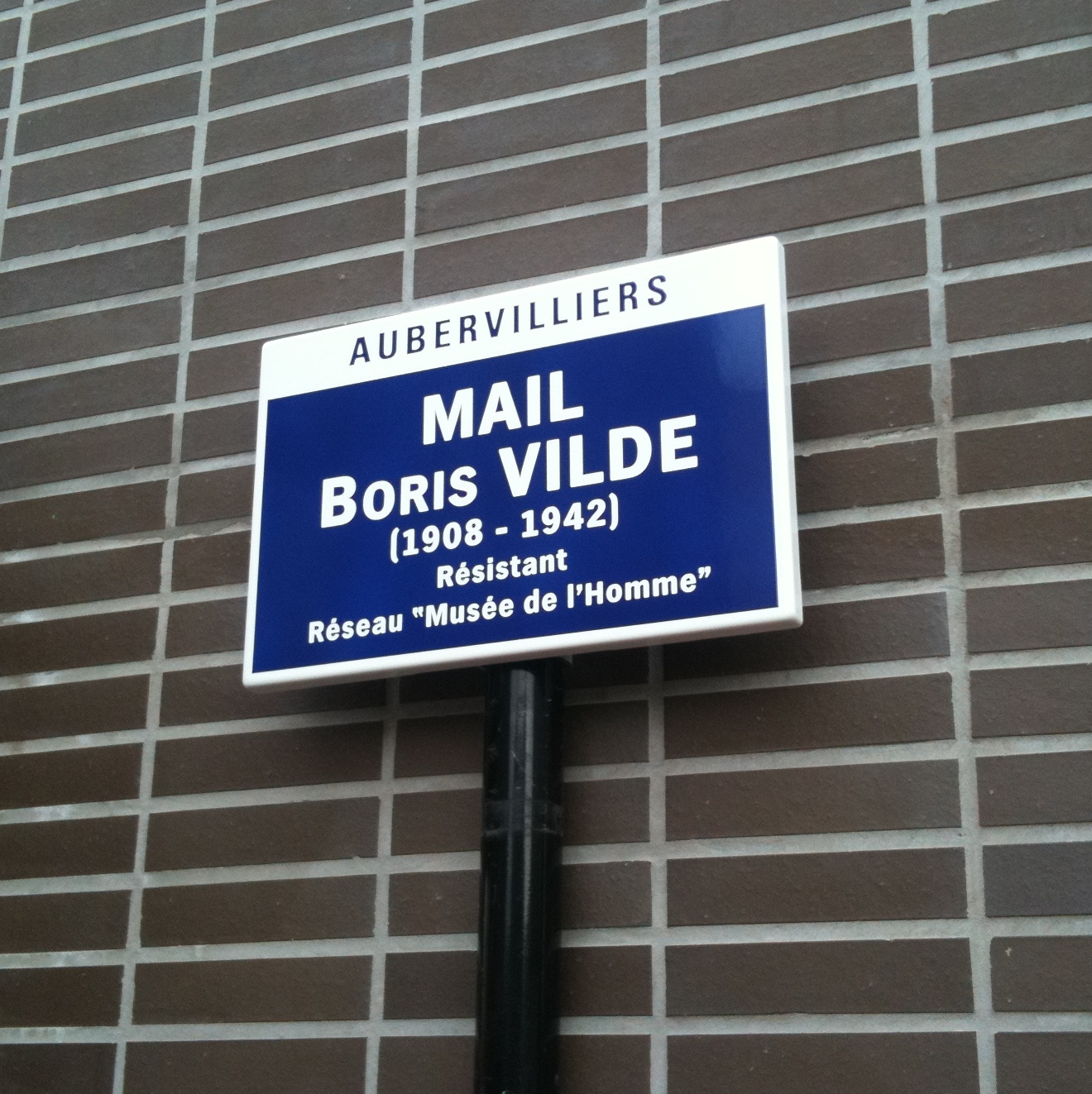 Le mail Boris Vildé à Aubervilliers, inauguré le 25 août 2010